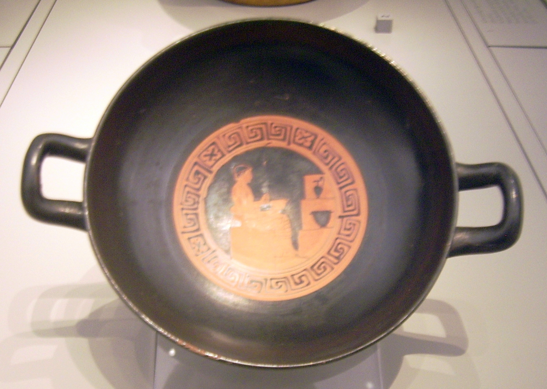 Attisch-rotfigurige Schale: Vasenatelier Schale (Gefäßform) 2. Viertel 5. Jh.v.Chr. Genauer: um 470 - 460 v.Chr. Fundort: Tarquinia (Italien) Ton, rotfigurig Höhe: 5,5 cm Durchmesser: 18 cm Ident.Nr. F 2542